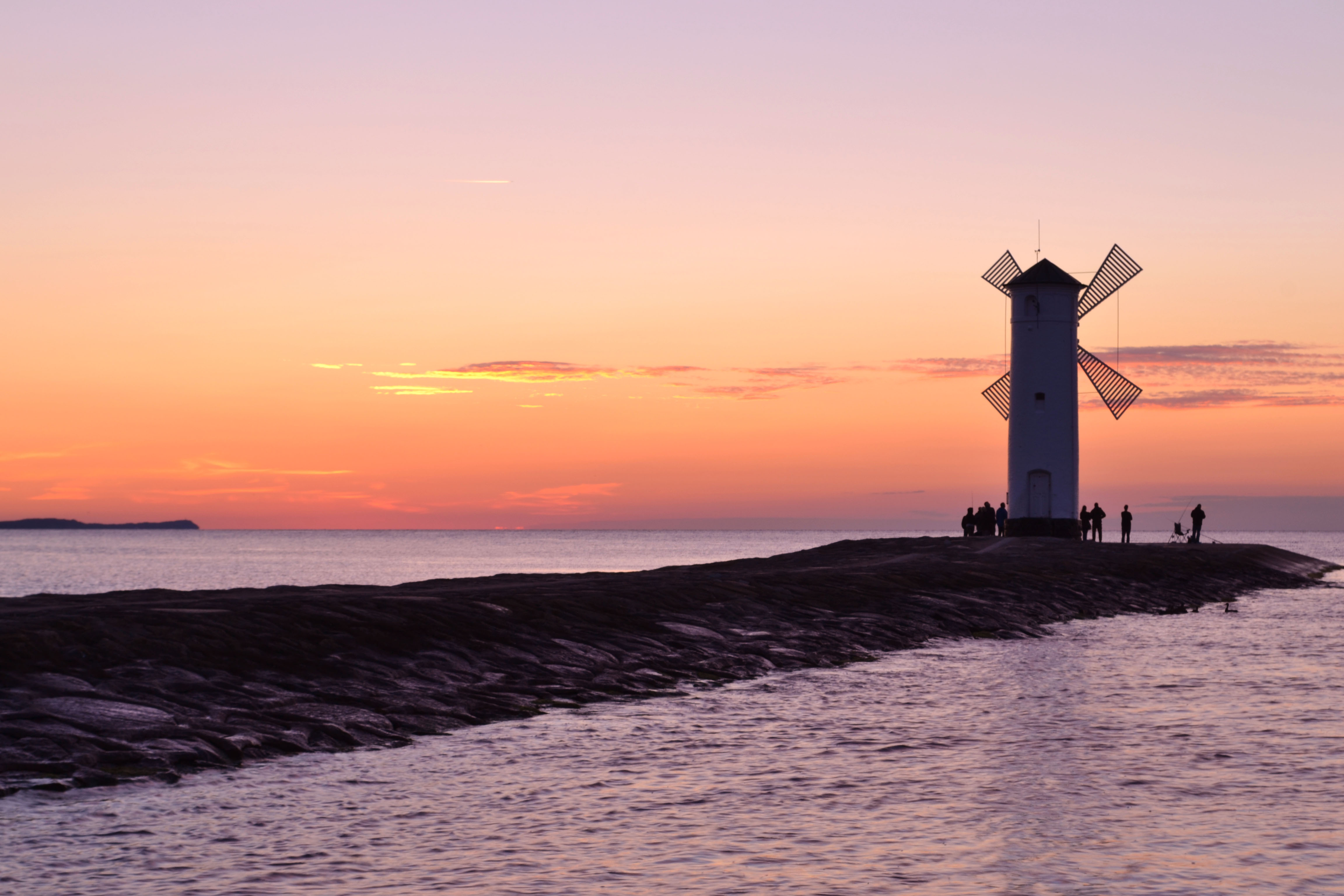 Widok na morze